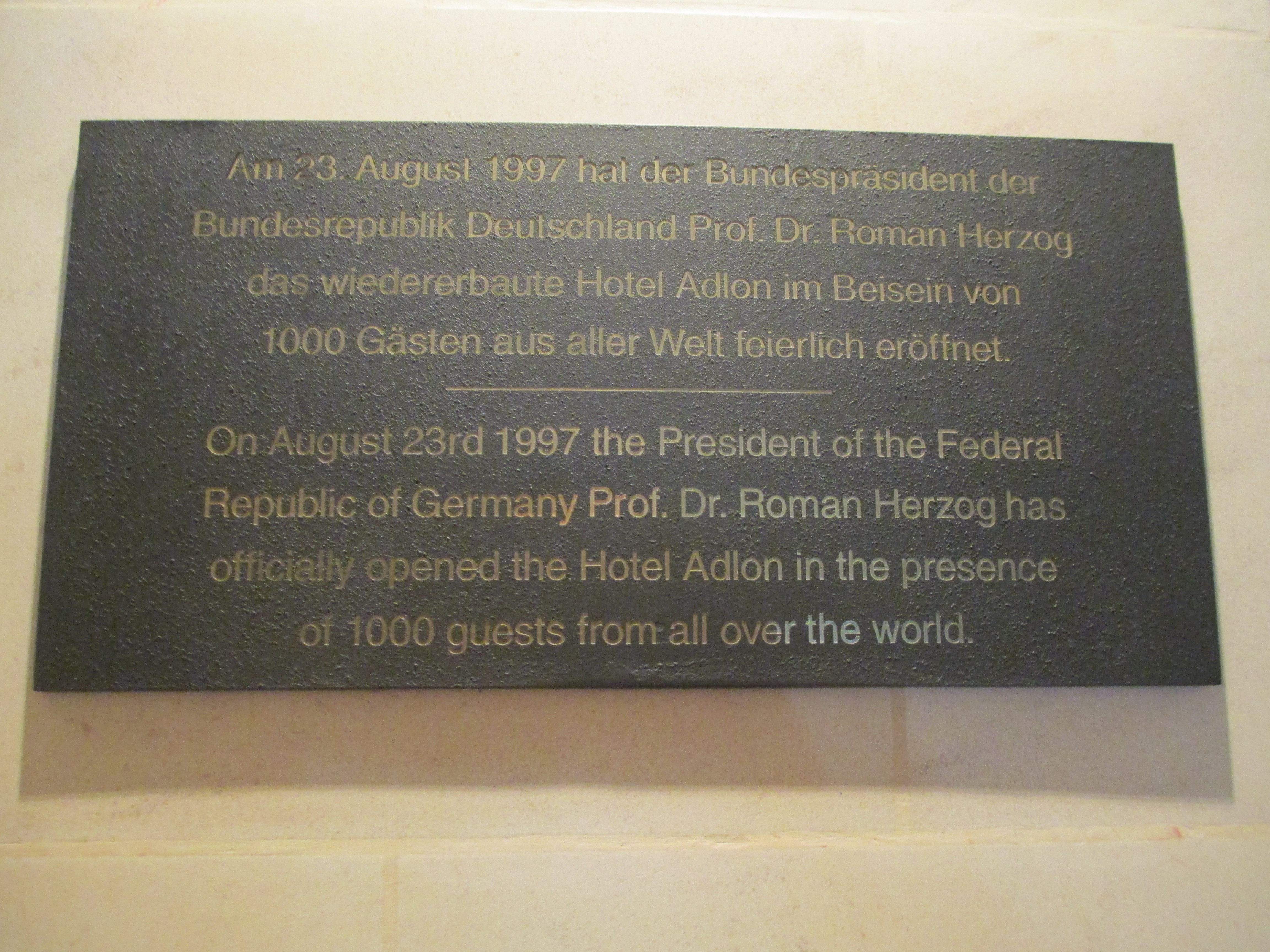 שלט בלובי של מלון אדלון בברלין